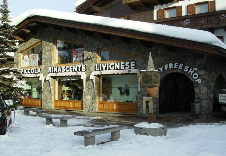 Livigno Italie tax free shop